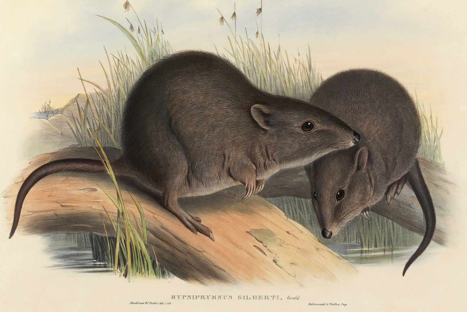 Potorous gilberti (orig. Hypsiprymnus gilberti)